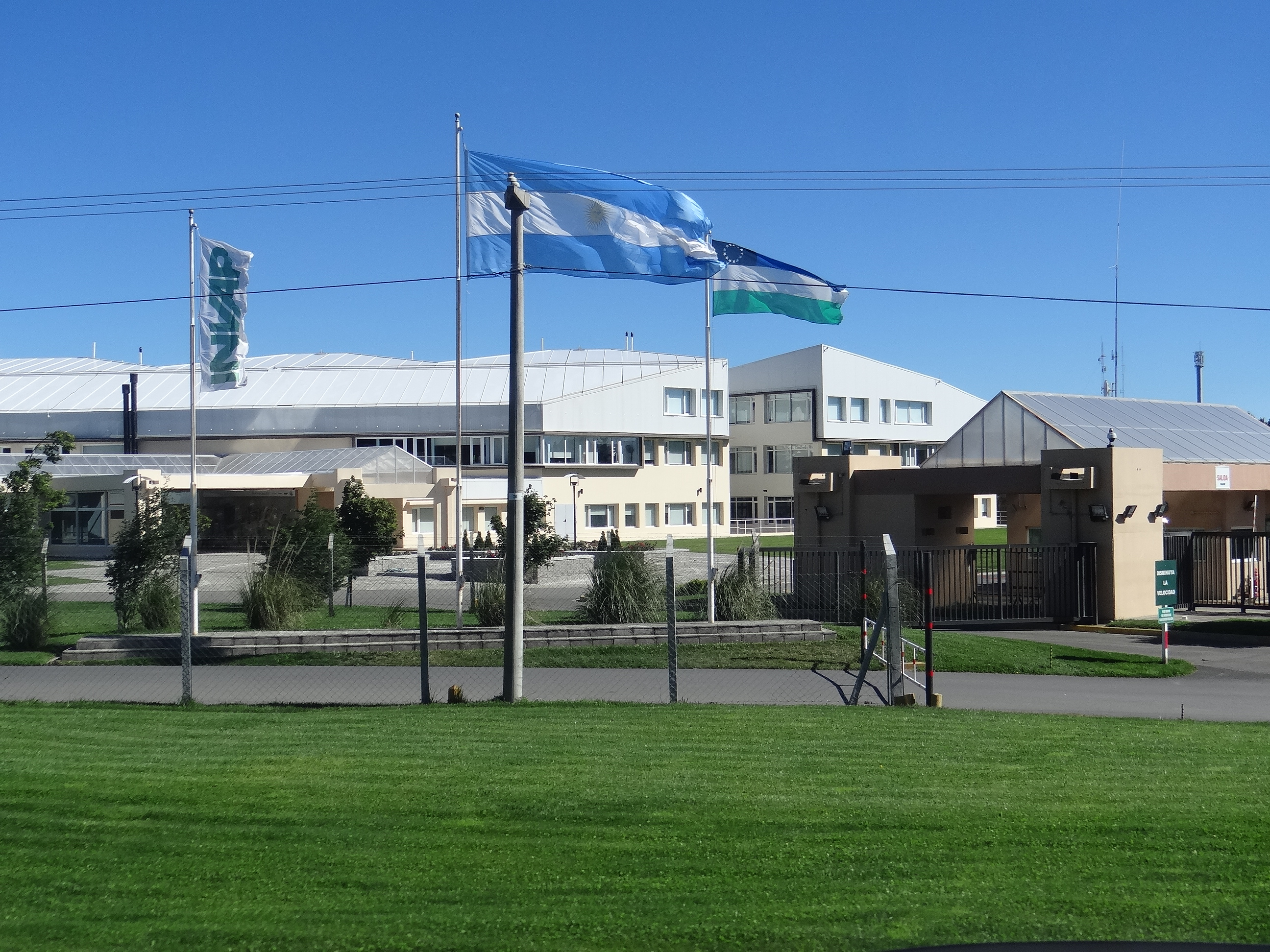 Sede central de INVAP en San Carlos de Bariloche